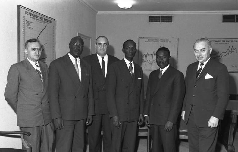 Besuch einer Regierungsdelegation aus Senegal unter Leitung des Ministers für Entwicklung und technische Zusammenarbeit, Karim Gaye, und des Ministers für Industrie und Handel, Gia Cissé, zu Wirtschaftsbesprechungen in der Bundesrepublik Deutschland. Delegation von Senegal: Karim Gaye, Minister für Entwicklung und industrielle Zusammenarbeit; Gia Cissé, Minister für Industrie und Handel; Dye Gaie, Vertreter bei der EWG in Brüssel; Tasson, Technischer Berater der Regierung; Djun Imor Deutsche Teilnehmer u. a.: Ministerialdirigent Görs (BMWi); VLR I Schlitter (AA)